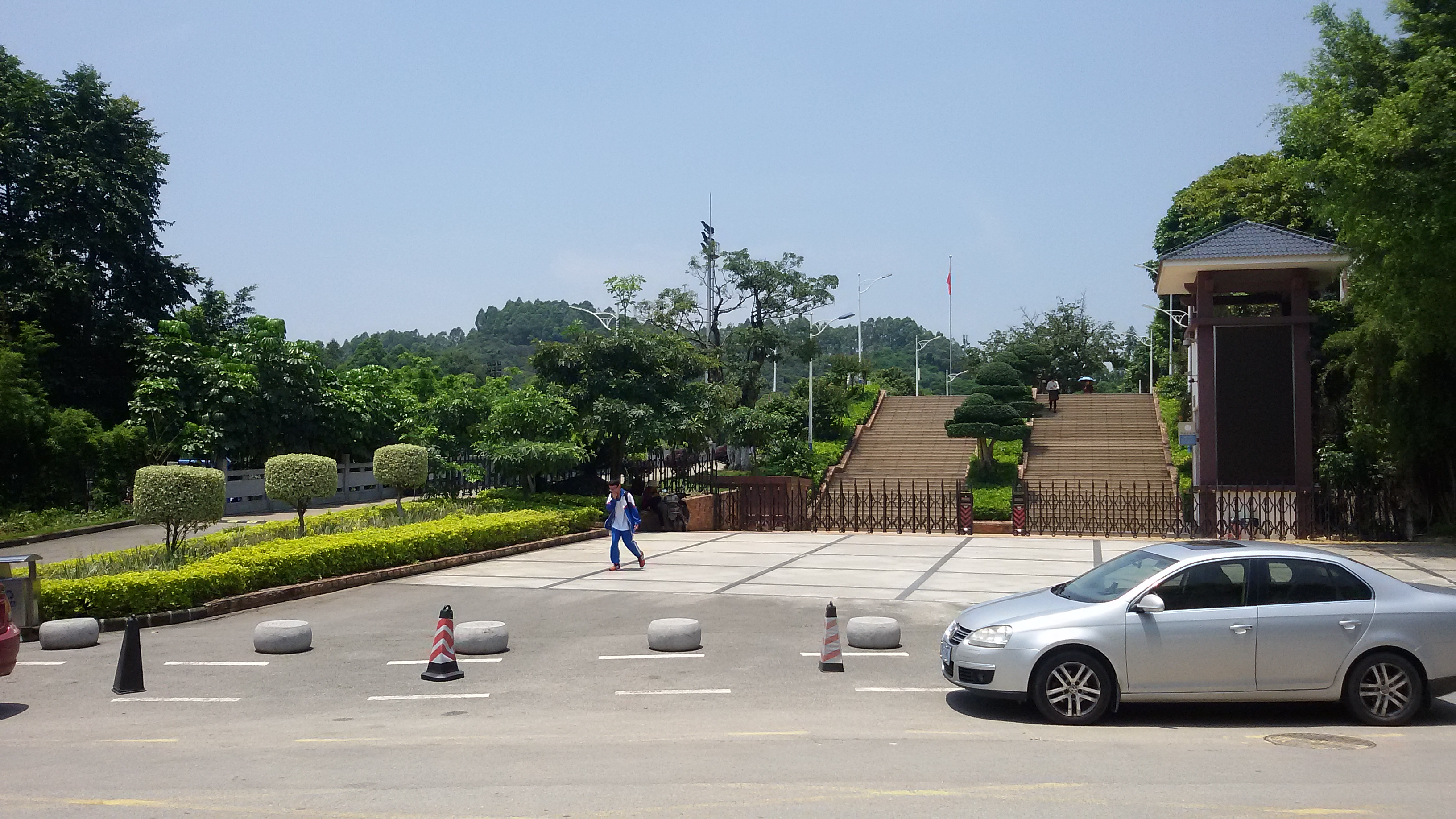 粵語: 廣州科學城中學